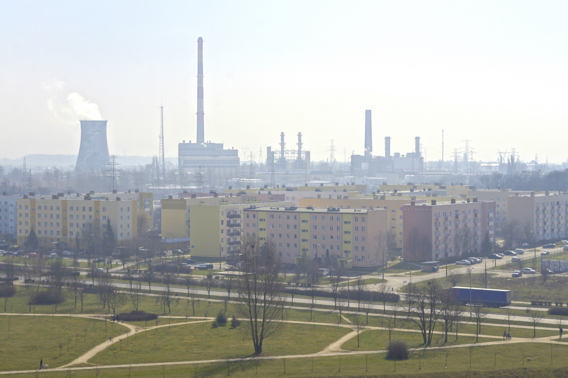 Gorzów Wlkp. Widok na gorzowską elektrociepłownię ( PGE Górnictwo i Energetyka Konwencjonalna S.A. Oddział Elektrociepłownia Gorzów ul. Energetyków 6 )